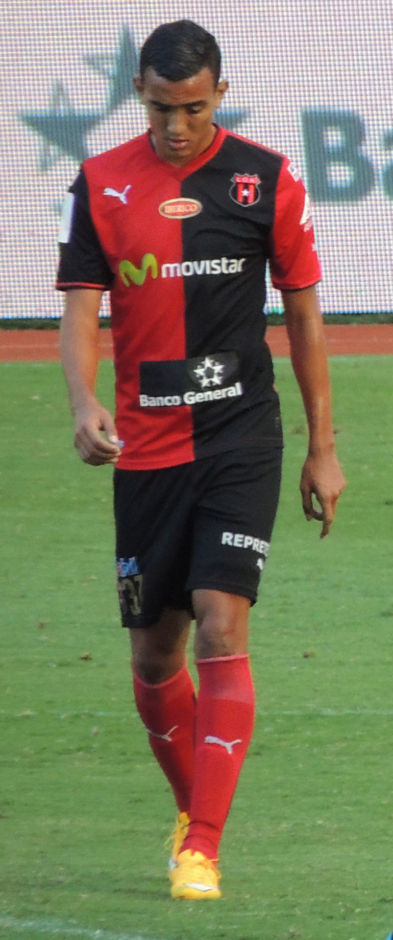 Esta obra de Luis Manuel Madrigal está bajo una licencia de Creative Commons Reconocimiento-CompartirIgual 4.0 Internacional. Para una versión sin logo escriba a